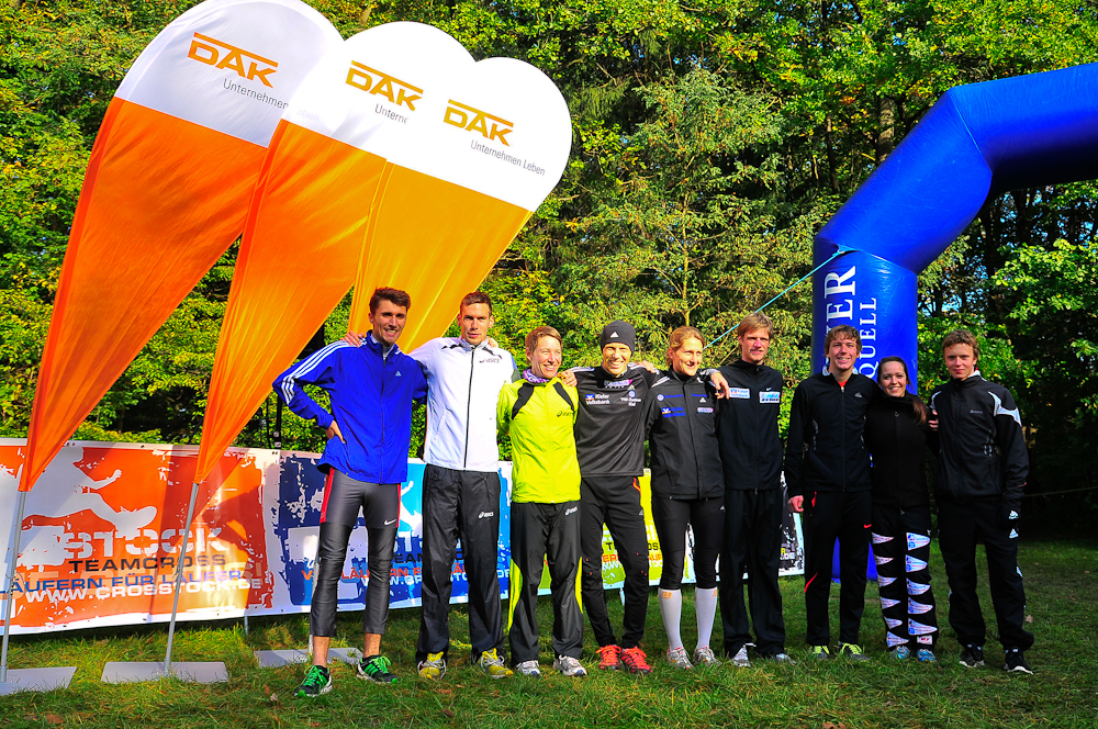 Die drei Erstplatzierten beim 6. CROSSTOCK TEAMCROSS, Tom Gröschel, Sebastian Rank, Christiane Pilz, Steffen Uliczka, Claudia Kratzenstein, Falko Vehling, Fabian Brunswig, Malyzia Vömel, Tilmann Petersen.